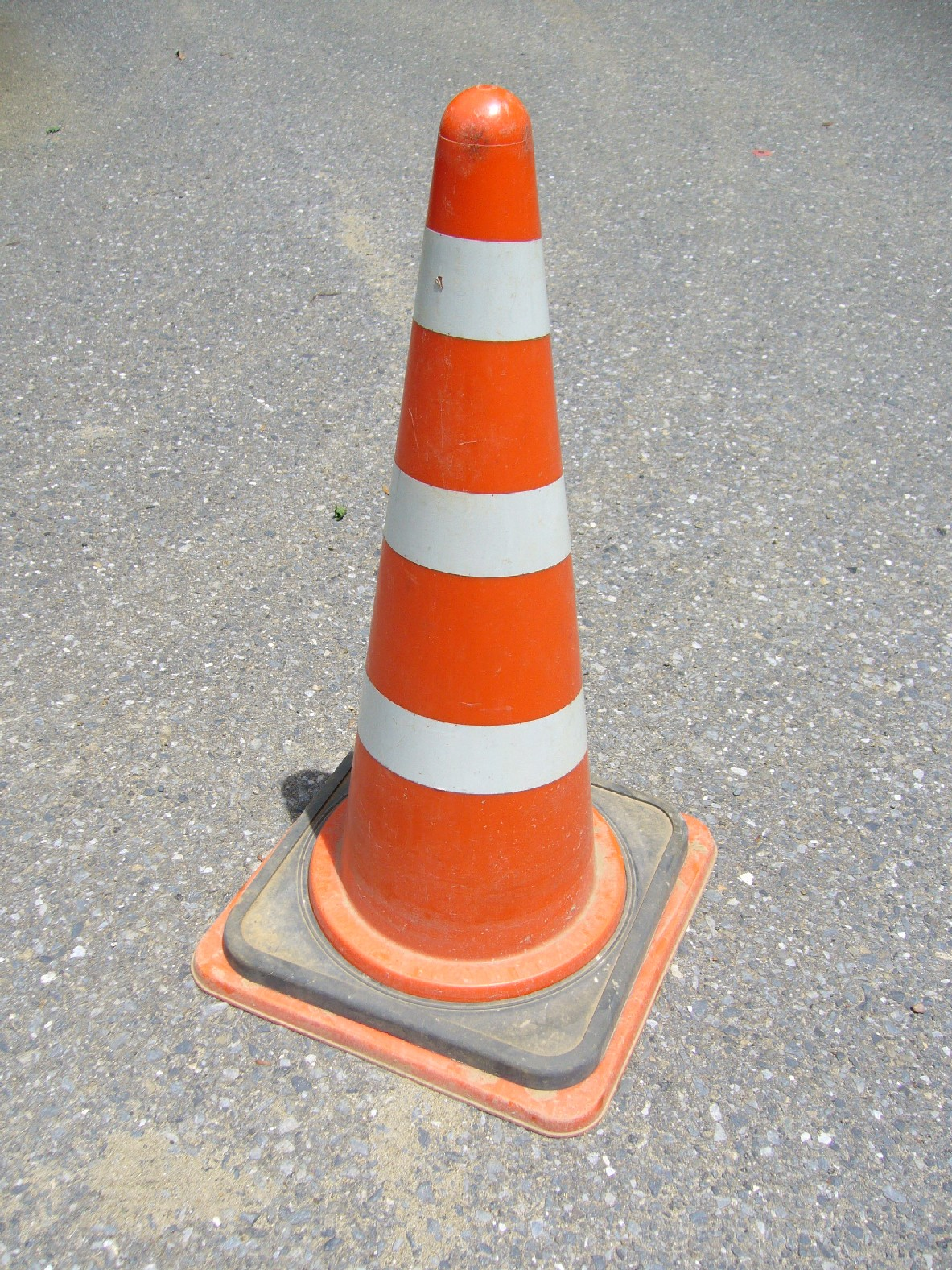 road-cones,sankaku-cones,japan